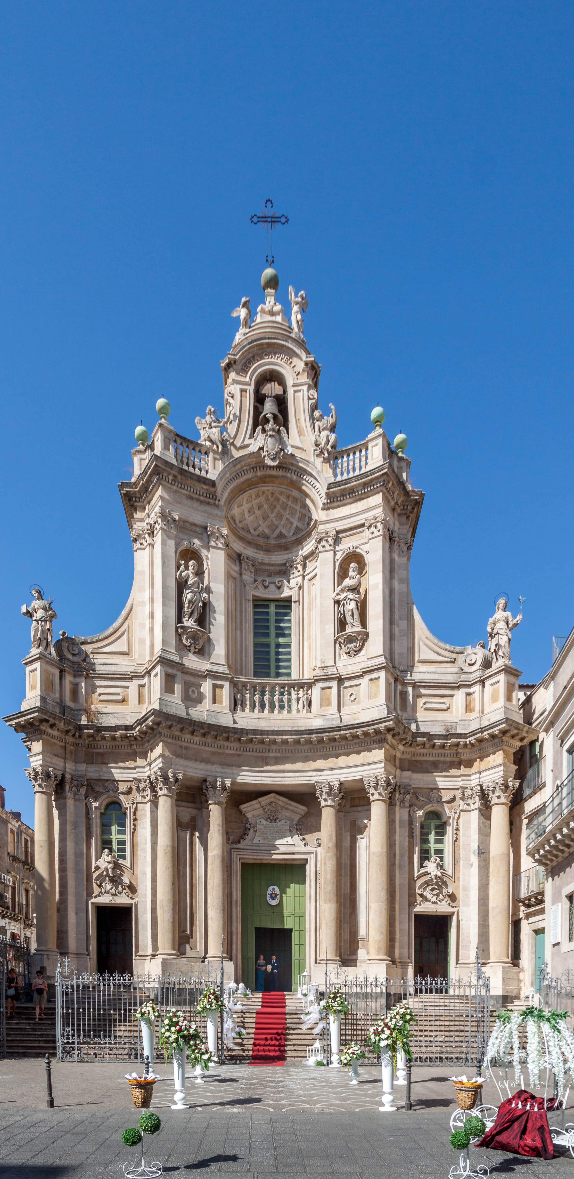 Santa Maria dell'Elemosina (Catania)